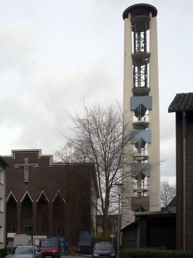 St. Peter im Essener Nordviertel, 1926–1927 erbaut, 1943 schwer beschädigt, 1951/1952 durch Emil Jung instand gesetzt, Turmruine 1956 gesprengt, neuer Glockenturm 1957, ehem. Kirche als Katholische Schule für Pflegeberufe Essen gGmbH genutzt.